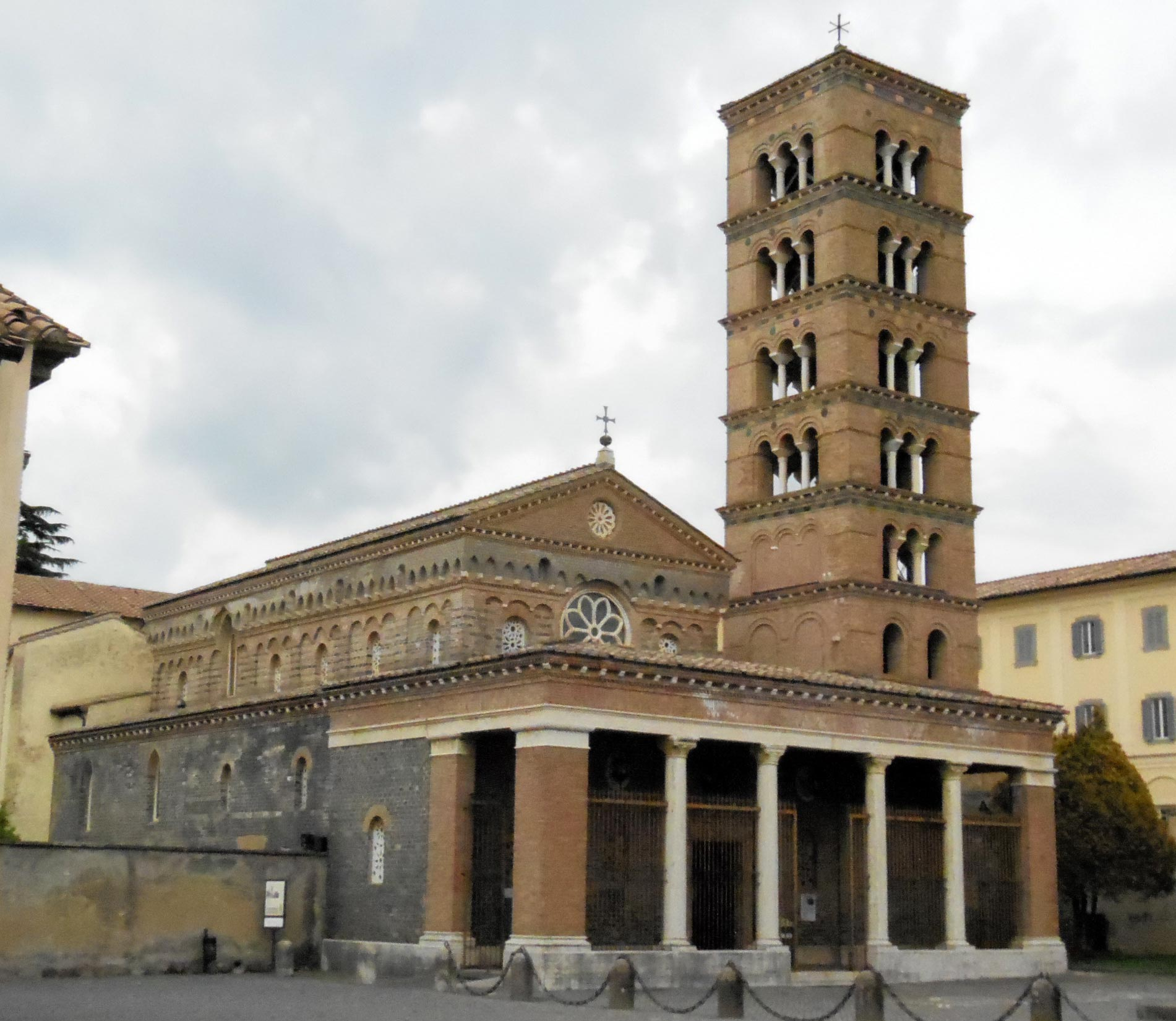 Italia, Lazio, provincia di Roma, Grottaferrata, abbazia territoriale di Santa Maria (abbazia di San Nilo), chiesa abbaziale